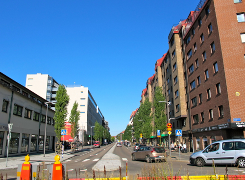 Friggagatan i Göteborg